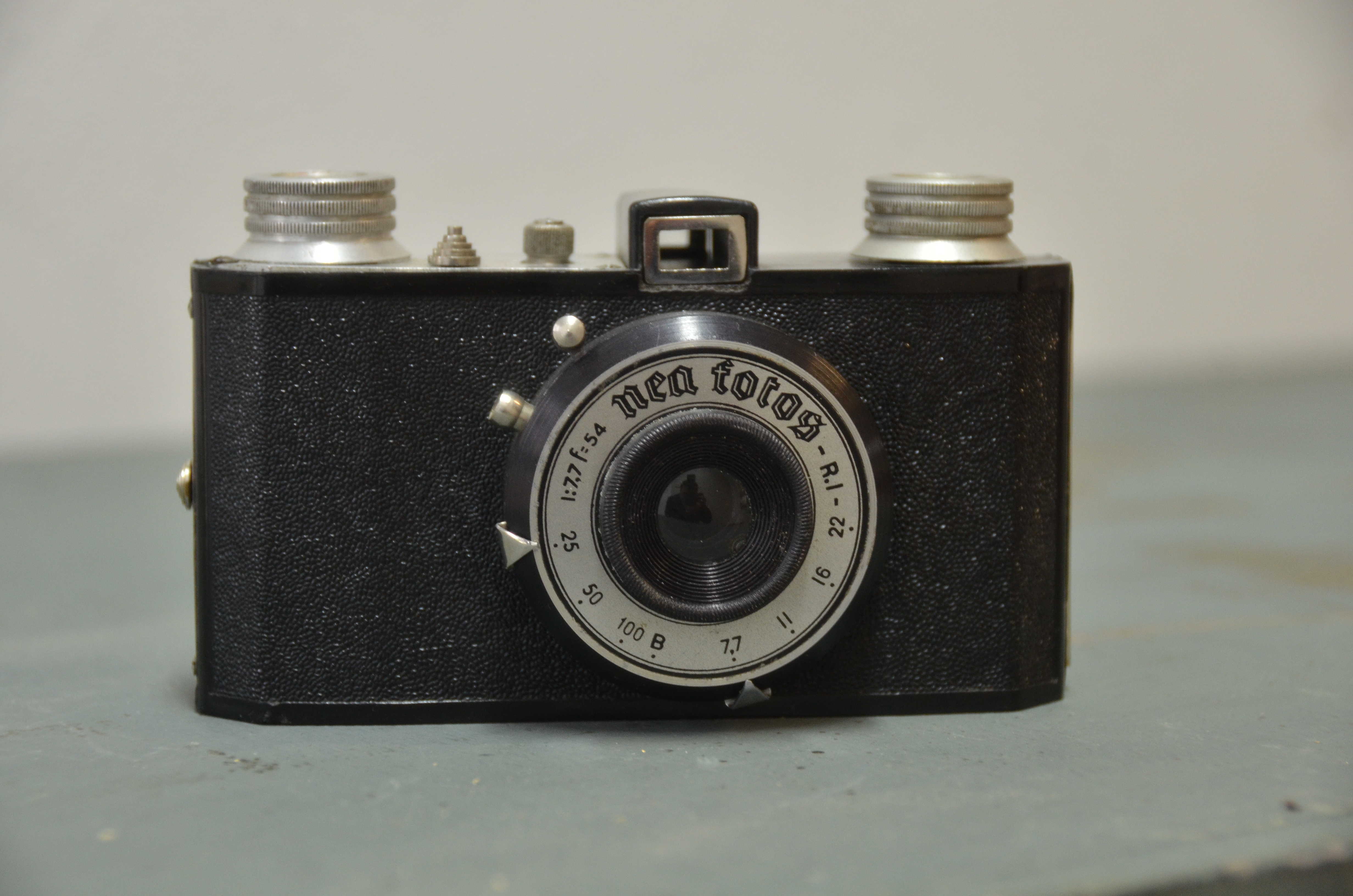 Neo fotos della RO.TO di Torino del 1948, fotocamera economica in bachelite formato 35 mm con mirino oculare, ottica 54 mm f7,7 otturatore con tempi di posa 25, 100 + B.